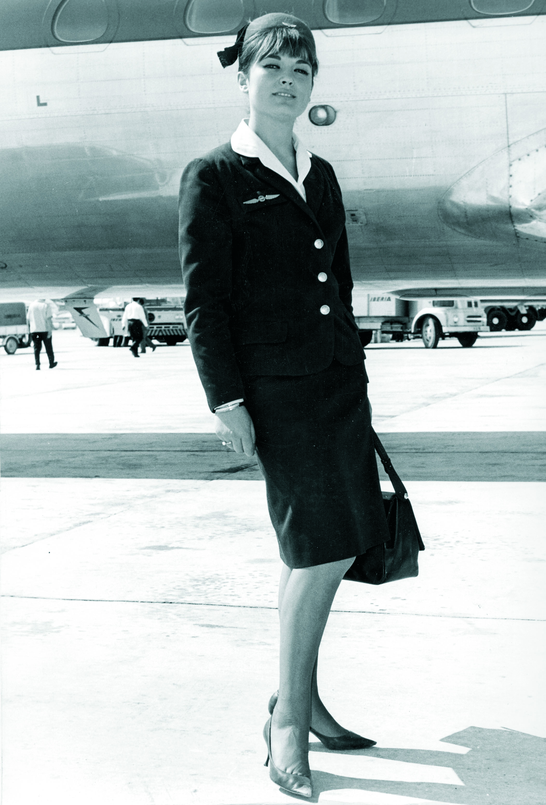 Pedro Rodríguez diseñó cuatro tipos de uniforme para Iberia, siendo el primer profesional de la moda en hacerlo. In 1962, Pedro Rodríguez became the first professional fashion designer to work for Iberia, designing four types of uniforms En 1962, Pedro Rodriguez devint le premier designer de mode professionel qui travaillat pour Iberia, créant ainsi 4 modèles d'uniformes. Nel 1962 Pedro Rodriguez disegnó quattro tipi di uniformi per Iberia,fu il primo stilista professionista a farlo. Em 1962 Pedro Rodriguez desenho quatro tipos de uniforme para a Iberia. Pedro Rodríguez war der erste professionelle Designer der Uniformen gemacht hat. Der Designer machte 4 Stück davon.